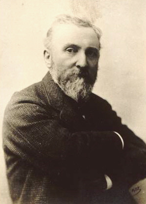 portrait de Henri Chapu, sculpteur (1833-1891) Artist Photo réalisée par Pierre Petit (1831-1909)Title portrait de Henri Chapu, sculpteur (1833-1891)Collection Musée d'Orsay Native nameMusée d'OrsayParent institutionÉtablissement public du musée d'Orsay et du musée de l'OrangerieLocationParisCoordinates48° 51′ 36″ N, 2° 19′ 35″ E Established1986Web page control : Q23402 VIAF: 130307757 ISNI: 0000 0001 2157 2575 ULAN: 500310001 LCCN: n84128587 NLA: 36024323 WorldCat institution QS:P195,Q23402Source/Photographer Réunion des musées nationaux This work is in the public domain in its country of origin and other countries and areas where the copyright term is the author's life plus 70 years or less. You must also include a United States public domain tag to indicate why this work is in the public domain in the United States. Note that a few countries have copyright terms longer than 70 years: Mexico has 100 years, Jamaica has 95 years, Colombia has 80 years, and Guatemala and Samoa have 75 years. This image may not be in the public domain in these countries, which moreover do not implement the rule of the shorter term. Côte d'Ivoire has a general copyright term of 99 years and Honduras has 75 years, but they do implement the rule of the shorter term. Copyright may extend on works created by French who died for France in World War II (more information), Russians who served in the Eastern Front of World War II (known as the Great Patriotic War in Russia) and posthumously rehabilitated victims of Soviet repressions (more information). This file has been identified as being free of known restrictions under copyright law, including all related and neighboring rights.